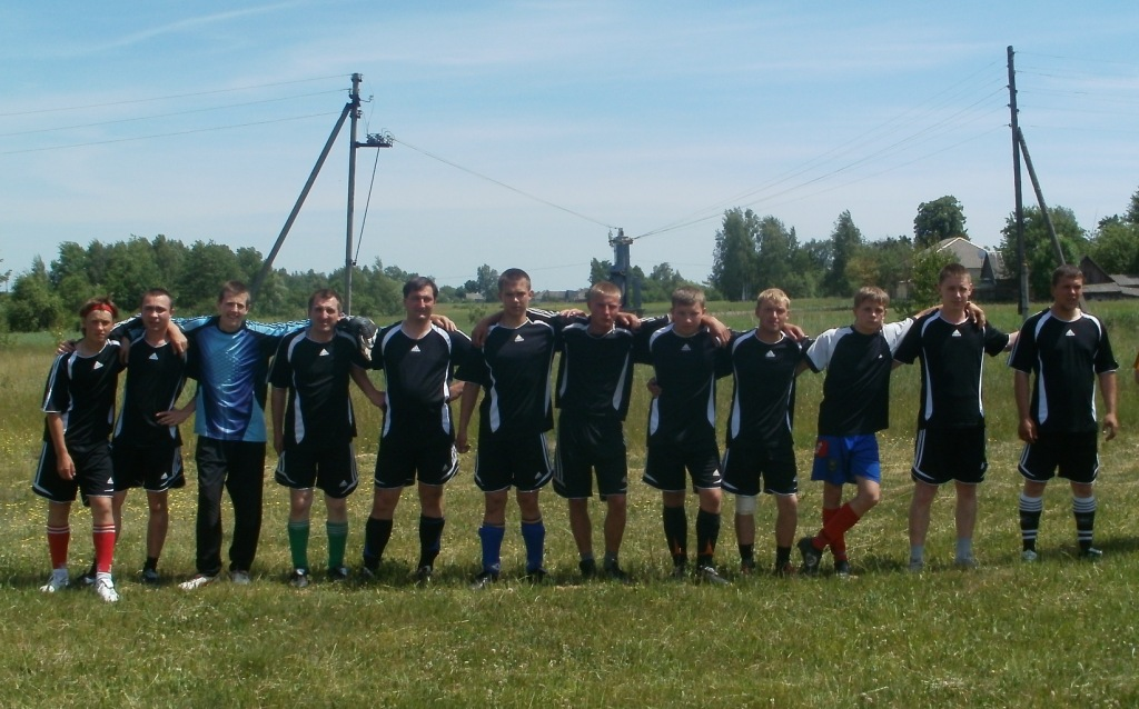 ФК "Явне" Чемпіонат району-2011